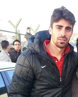 Doğan antrenmandan sonra taraftarımız ile fotoğraf çektirdi.